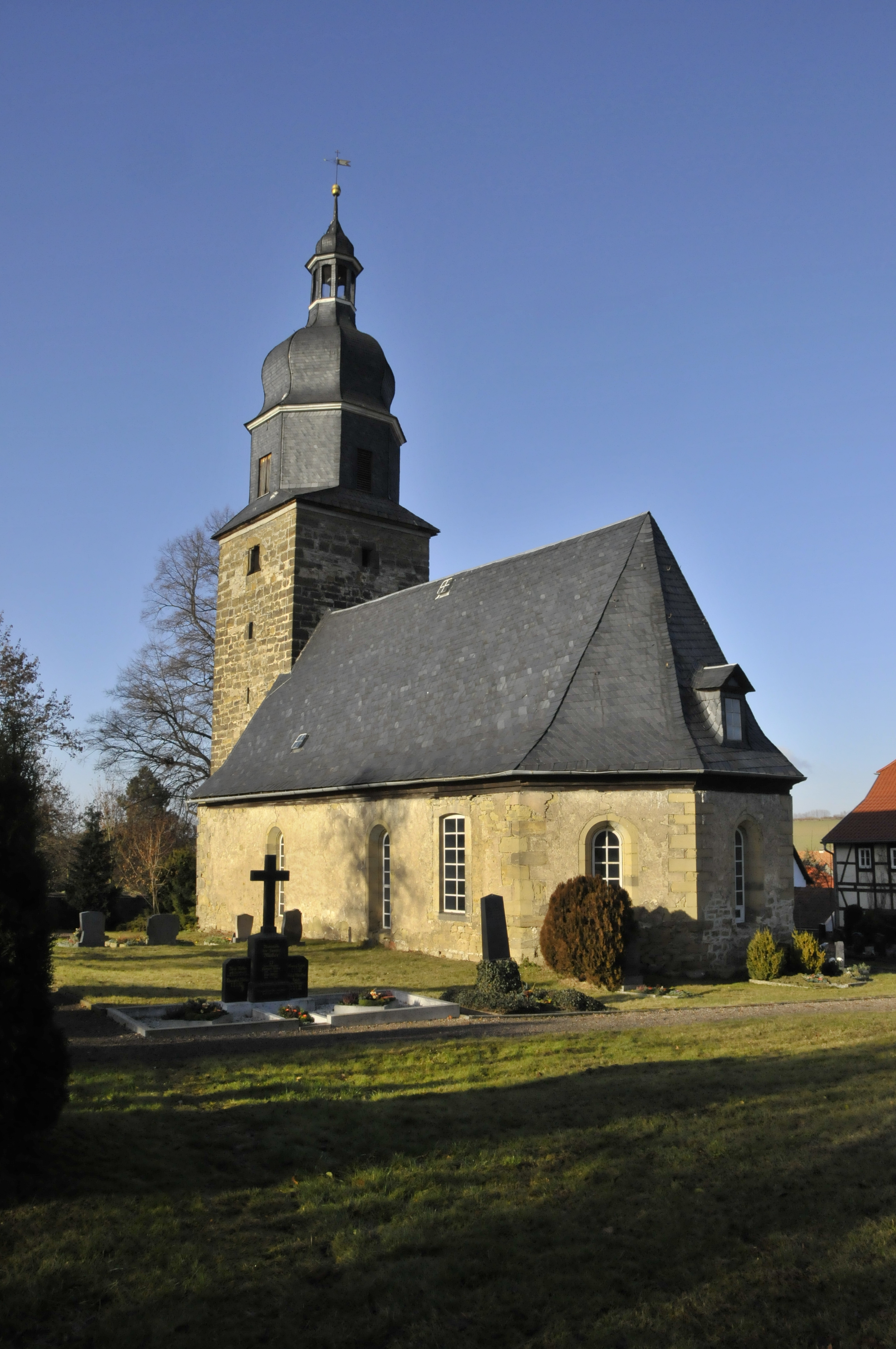 Rockhausen, Kirche